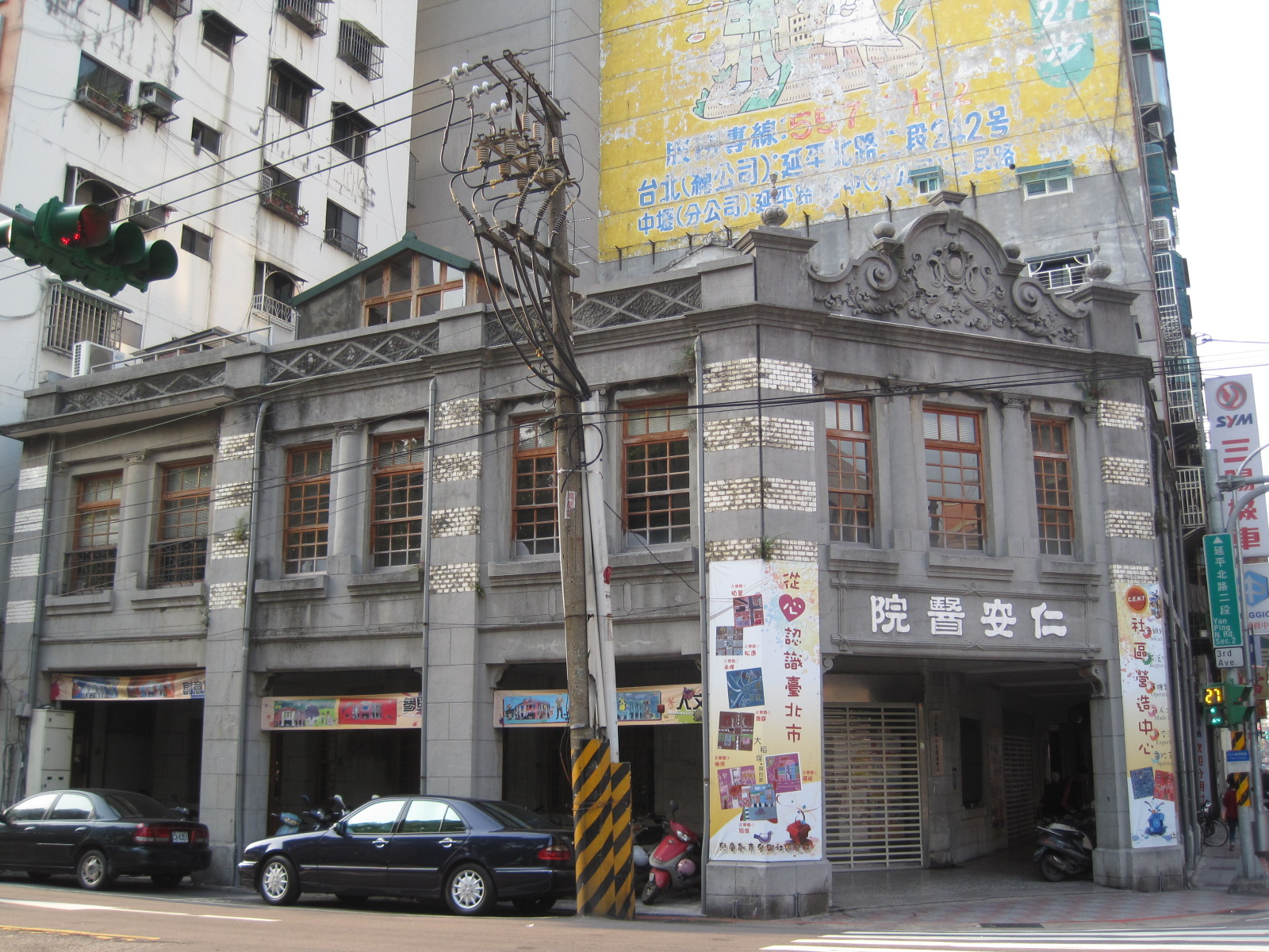 中文（台灣）: 位在臺北市大同區酒泉街與延平北路二段路口的仁安醫院。